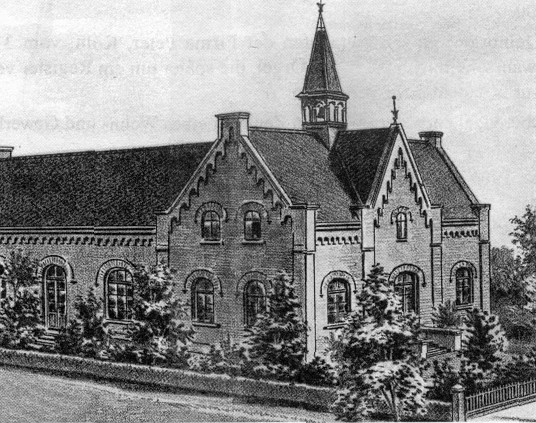 Griechisch-orthodoxe Kirche Wuppertal-Uellendahl